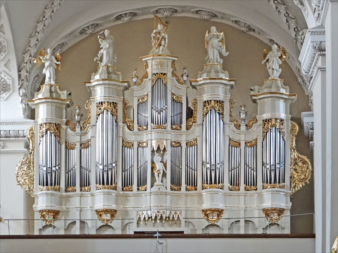 Située sur un très ancien lieu de culte païen, la cathédrale catholique a été reconstruite plusieurs fois en raison des destructions causées par les guerres. Les premières églises ont été élevées par Mindaugas en 1251. Article de Wikipedia sur la cathédrale